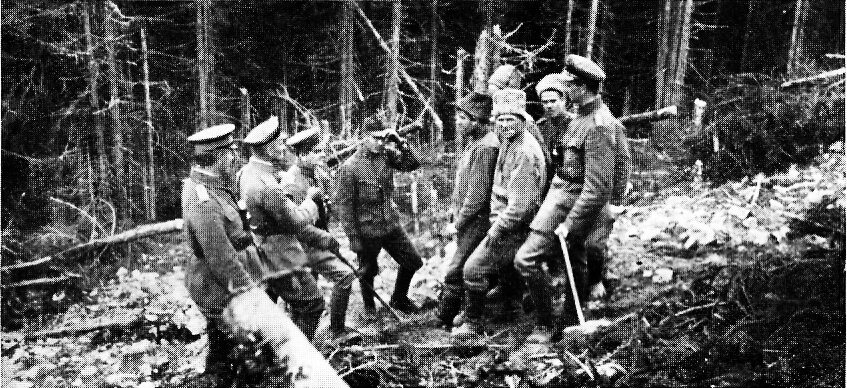 Treffen vor dem russischen Drahtverhau